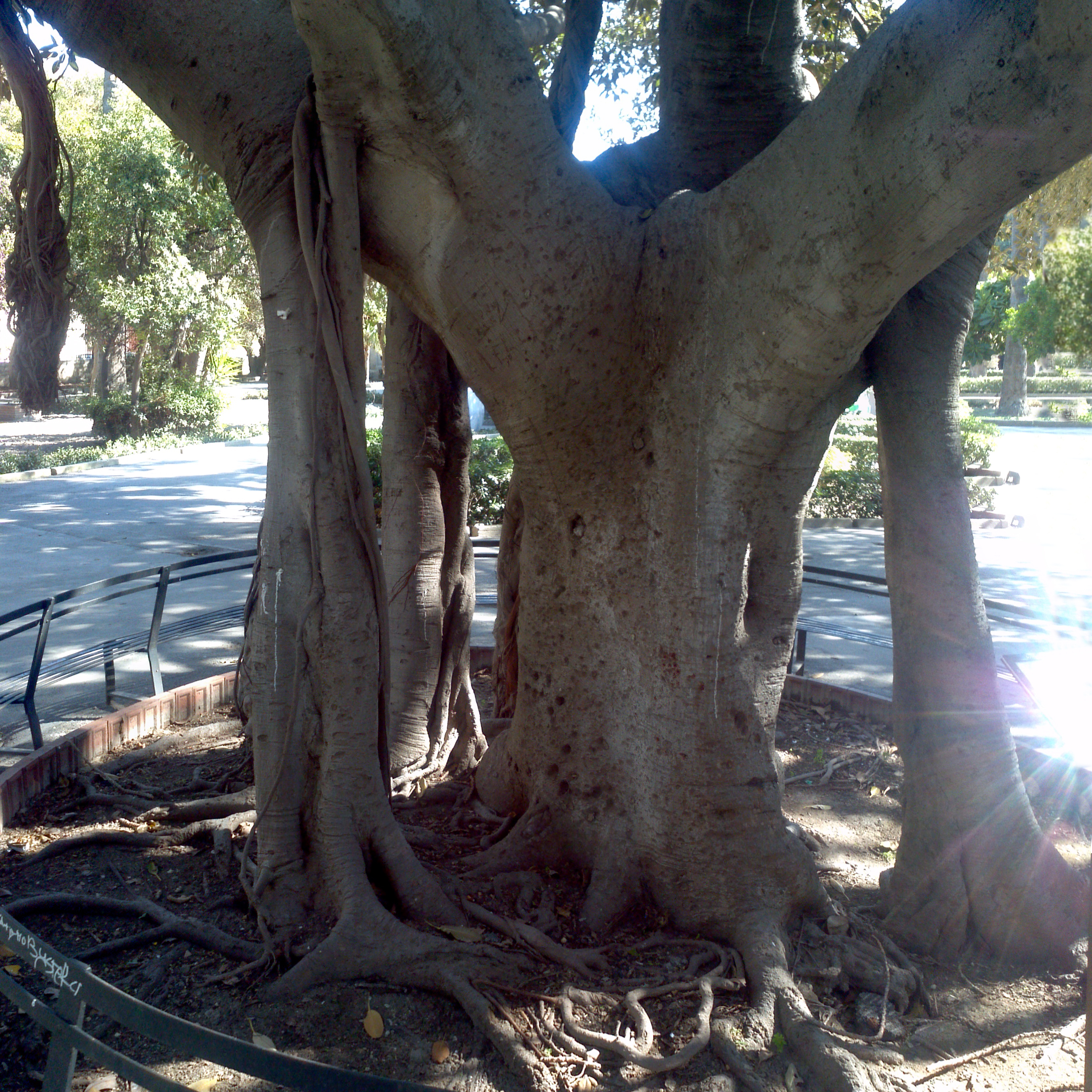 Stamm und Luftwurzeln einer Großblättrigen Feige, Trapani.jpgim Park Villa Margherita, Trapani